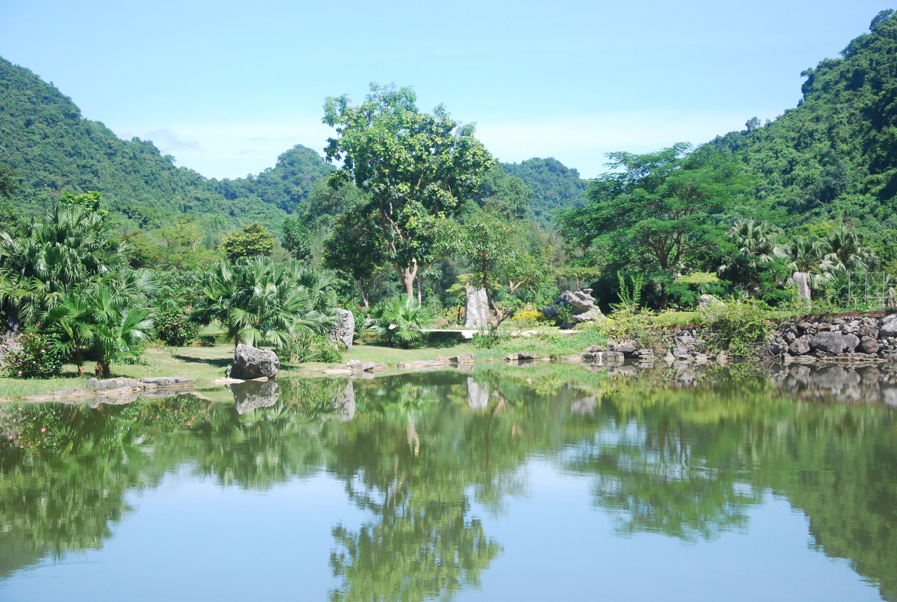 Phong cảnh Khu du lịch sinh thái Thung Nham ở Ninh Bình